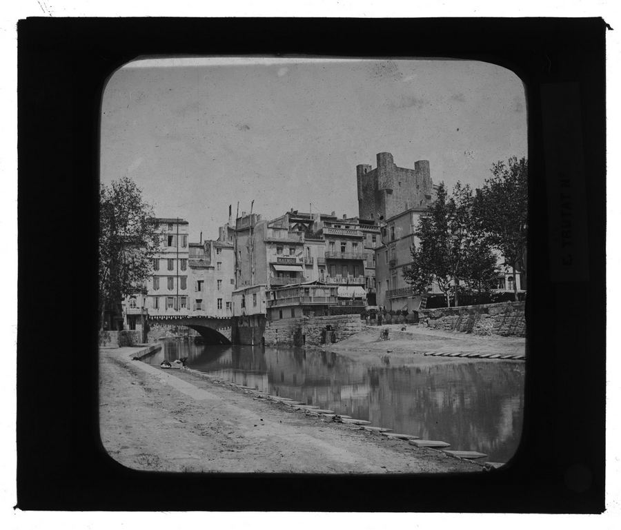 Pont sur le canal de la Robine à Narbonne (Aude). Fin 19e siècle. Vue d'ensemble du pont et du canal. En arrière plan tour médiévale du palais des archevêques. Etiquette imprimée : « E. Trutat N° ».